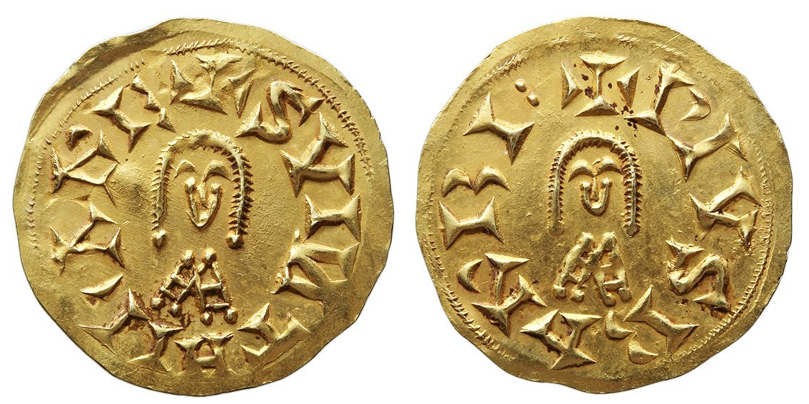 Tremis visigodo de oro acuñado en Singilia Barba ("Barbi") durante el reinado de Suintila. Leyendas: anverso "+SVINTHILA RE" reverso "PIVS BARBI:" Conservación: EBC-.